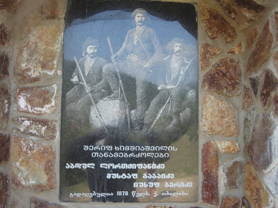 გენერალ შერიფ ხიმშიაშვილის თანამებრძოლები: აბდულ ლორთქიფანიძე, მუსტაფ გაბაიძე და იუსუფ ბერიძე